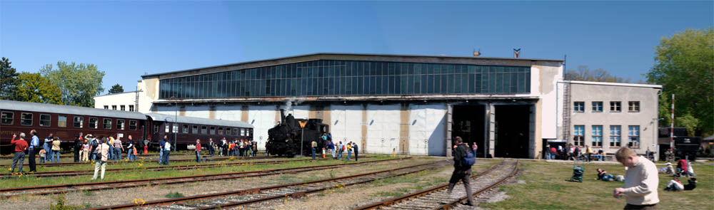 ErlebnisWeltBahn Strasshof - Das Heizhaus, April 2007